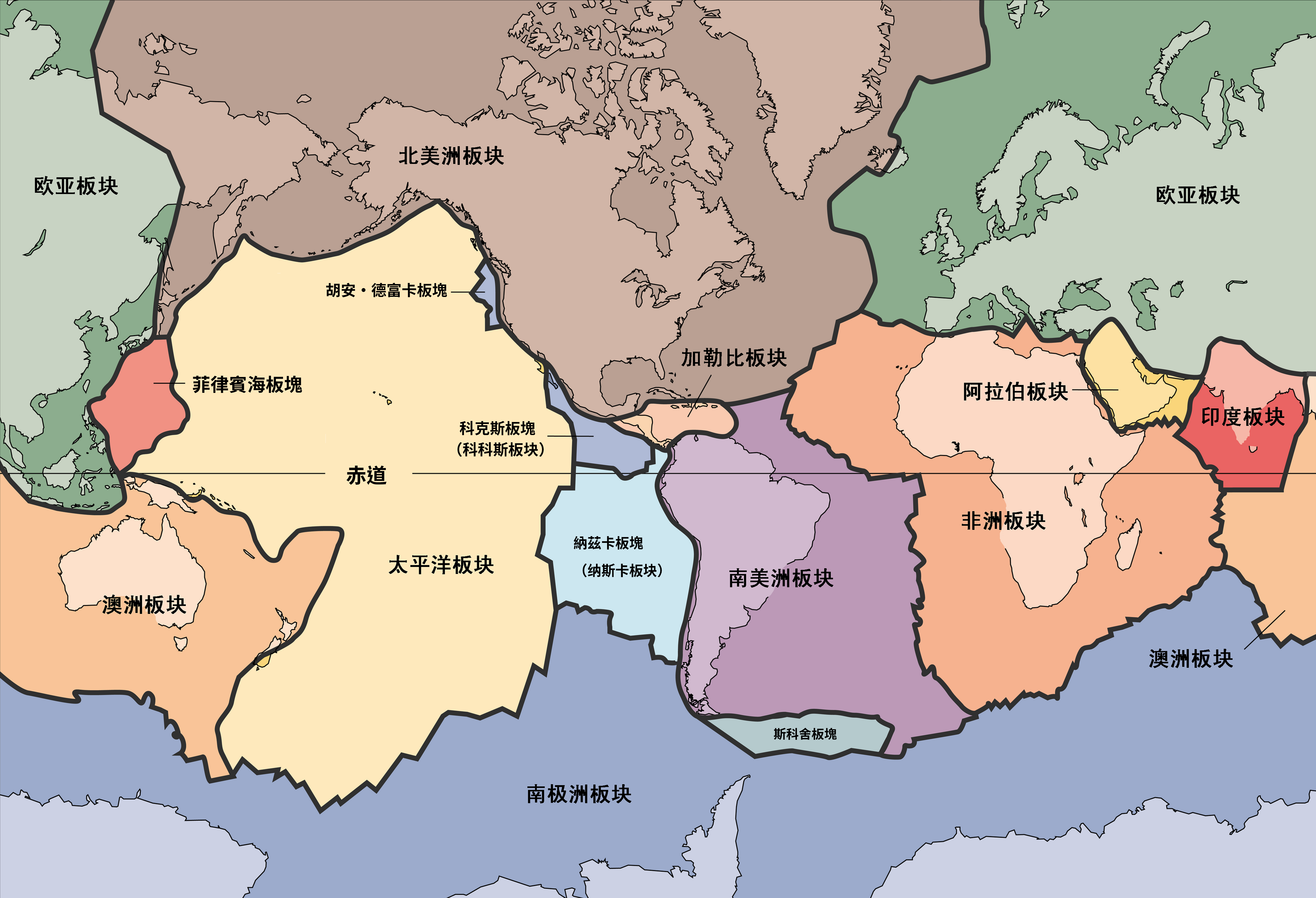 全球板块图